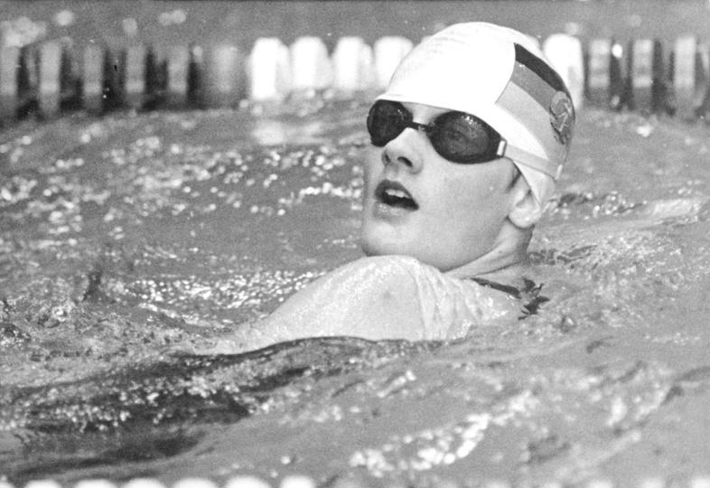 Kristin Otto ADN-ZB Kluge 22.5.84 Magdeburg: 35. DDR-Schwimm-Meisterschaften- Die dreifache Weltmeisterin von 1982 Kristin Otto (SC DhfK Leipzig) nach dem Anschlag über 100 m Freistil, die sie in der Jahresweltbestzeit von 54,94 sec vor Birgit Meineke (SC Dynamo Berlin-55,51 sec) und Heike Friedrich (SC Karl-Marx-Stadt-56.60 sec) gewann. Kristin Otto blieb damit nach Weltrekordhalterin Barbara Krause (Sc Dynamo Berlin) als zweite Schwimmerin der Welt unter 55 Sekunden. Abgebildete Personen: Otto, Kristin: Schwimmerin, Olympiateilnehmerin 1988, DDR